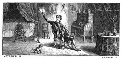 "Qu’il est glorieux d’ouvrir une nouvelle carrière, et de paraître tout à coup dans le monde savant, un livre de découvertes à la main, comme une comète inattendue étincelle dans l’espace!"